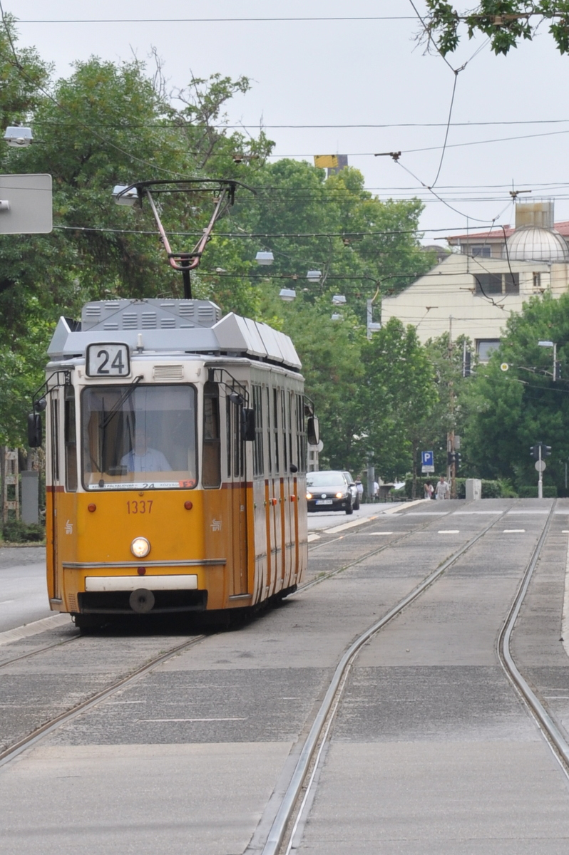 24-es villamos a Haller utcában a Nagyvárad tér felé közeledve, Budapest